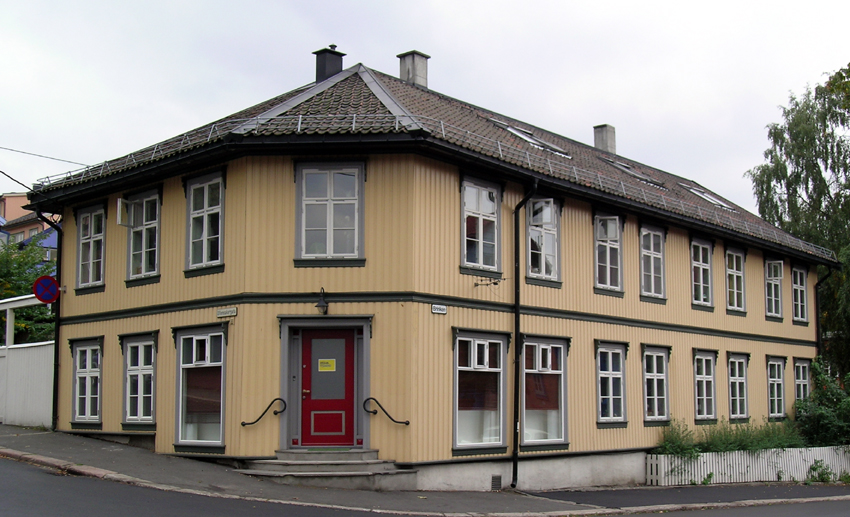 Ullensakergata 1, Oslo. Apartment house erected 1876.